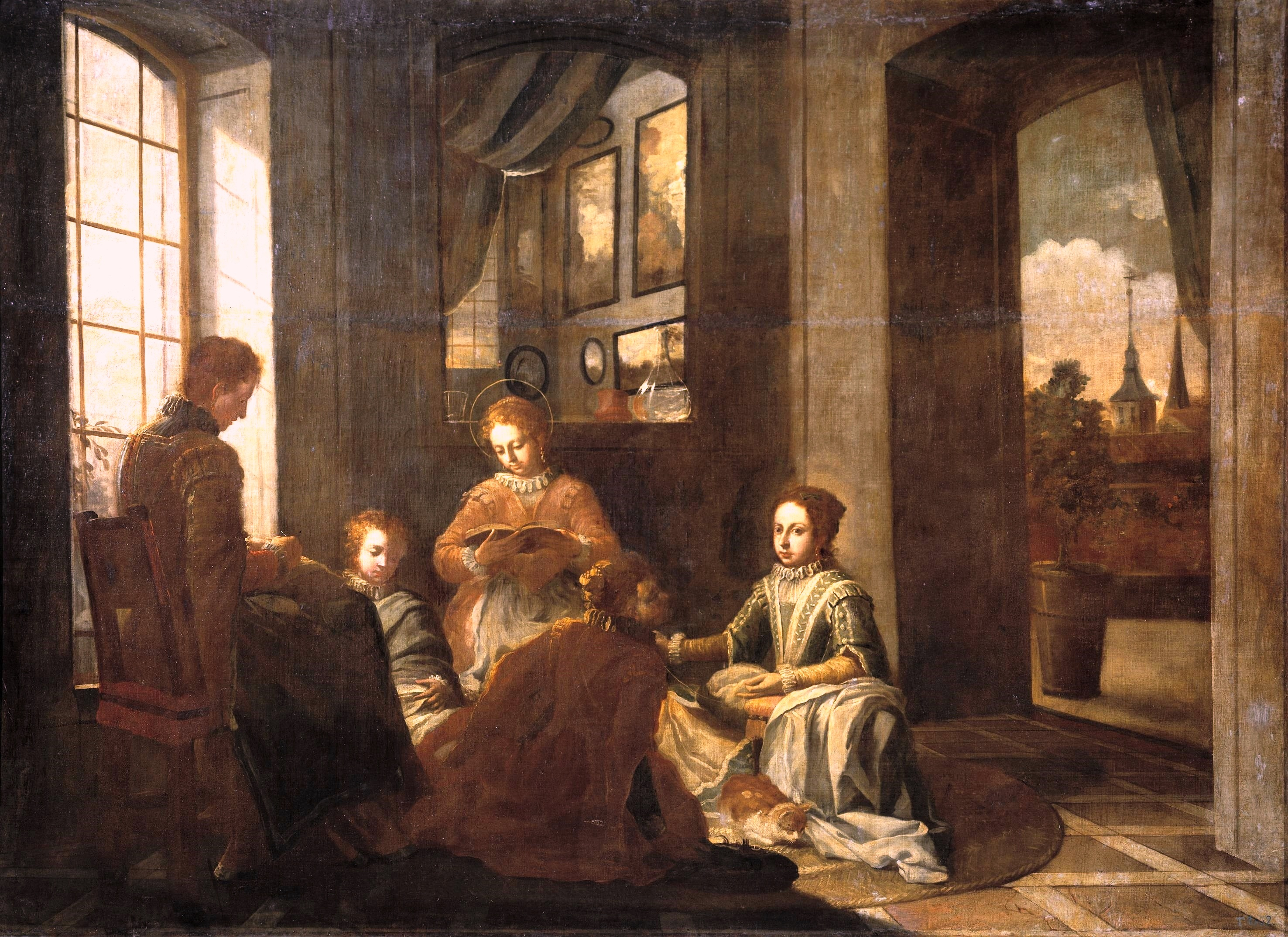 La obra representa la educación hogareña de la mística española Santa Teresa de Jesús (1515-1582), que aparece leyendo un libro en compañía de sus familiares.